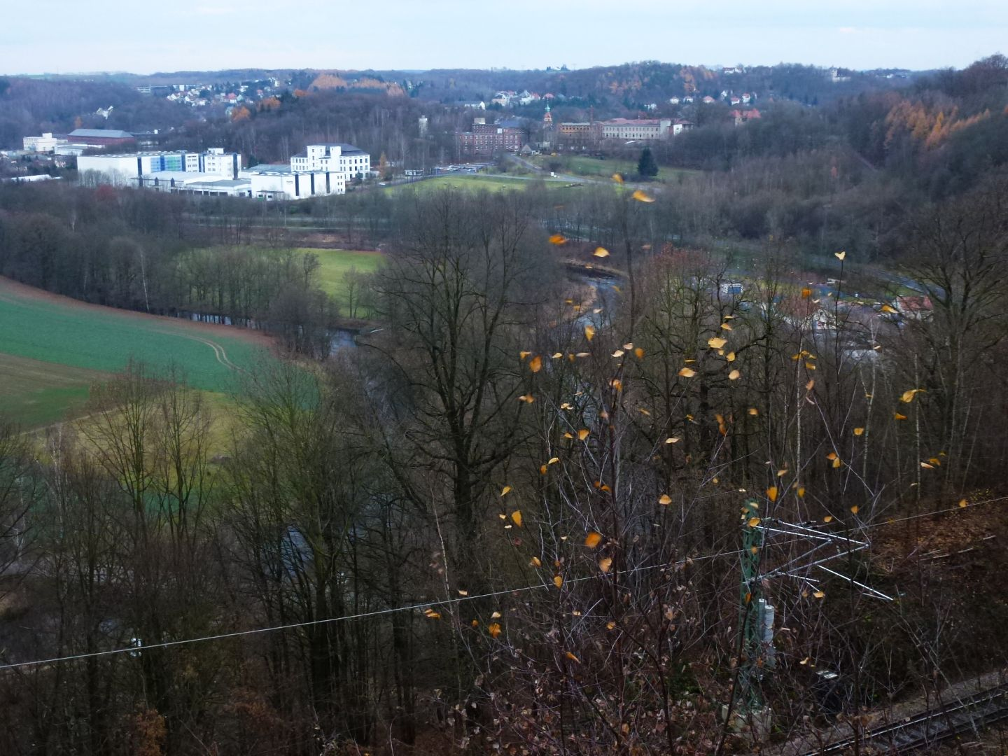 Blick auf Waldheim und die Zschopau vom Stufenberg